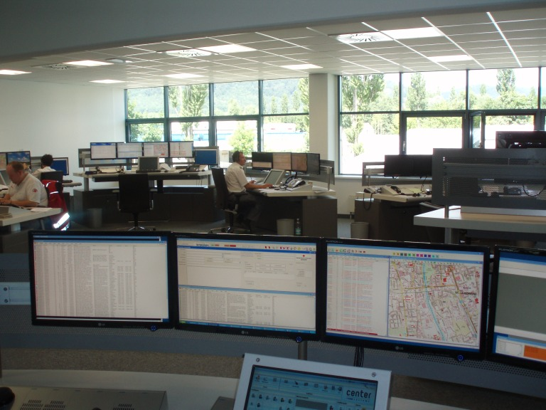 moderne Leitstelle, Österreichisches Rotes Kreuz, Landesverband Steiermark, Rettungsleitstelle